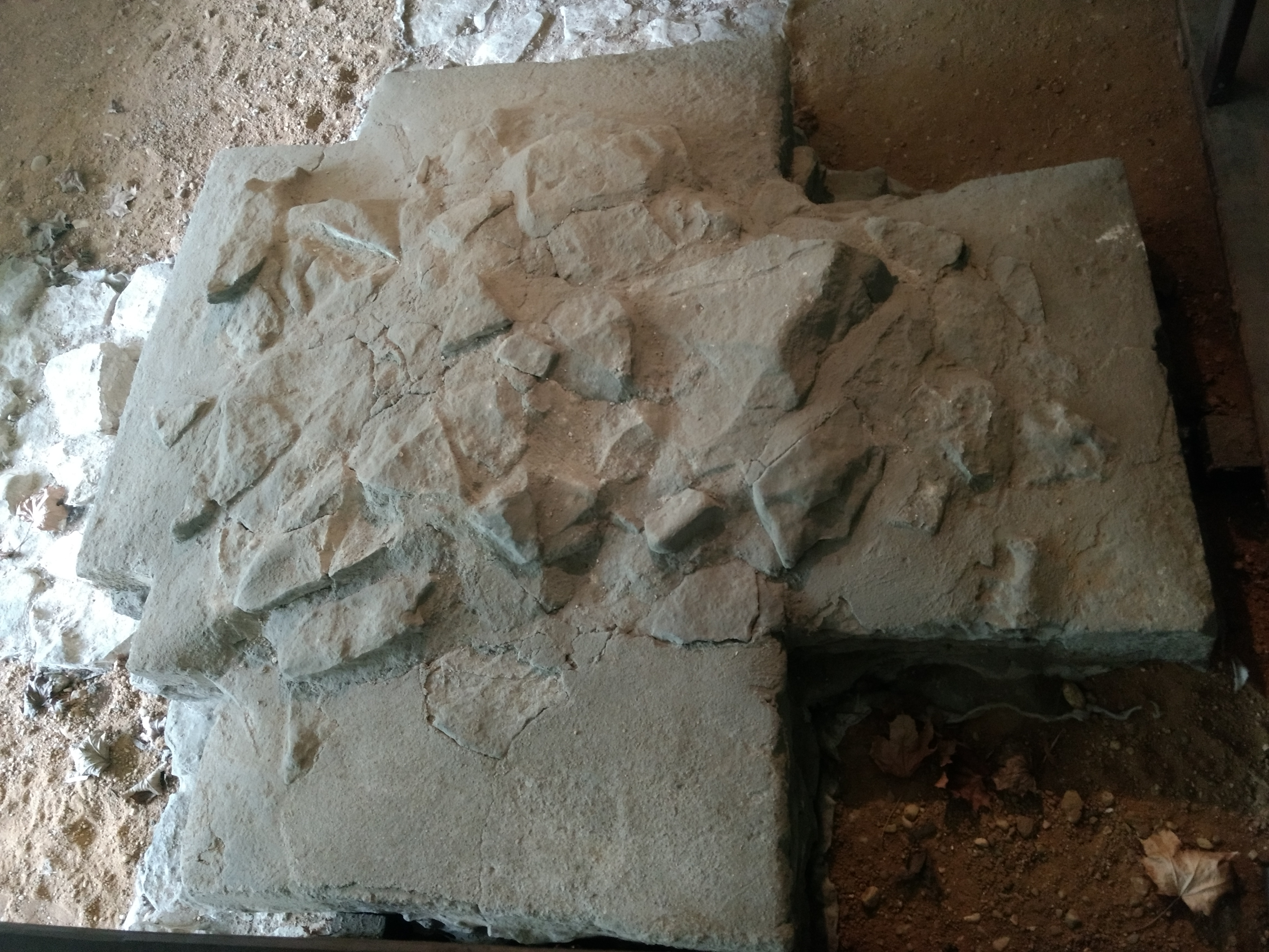 detail múrov baziliky